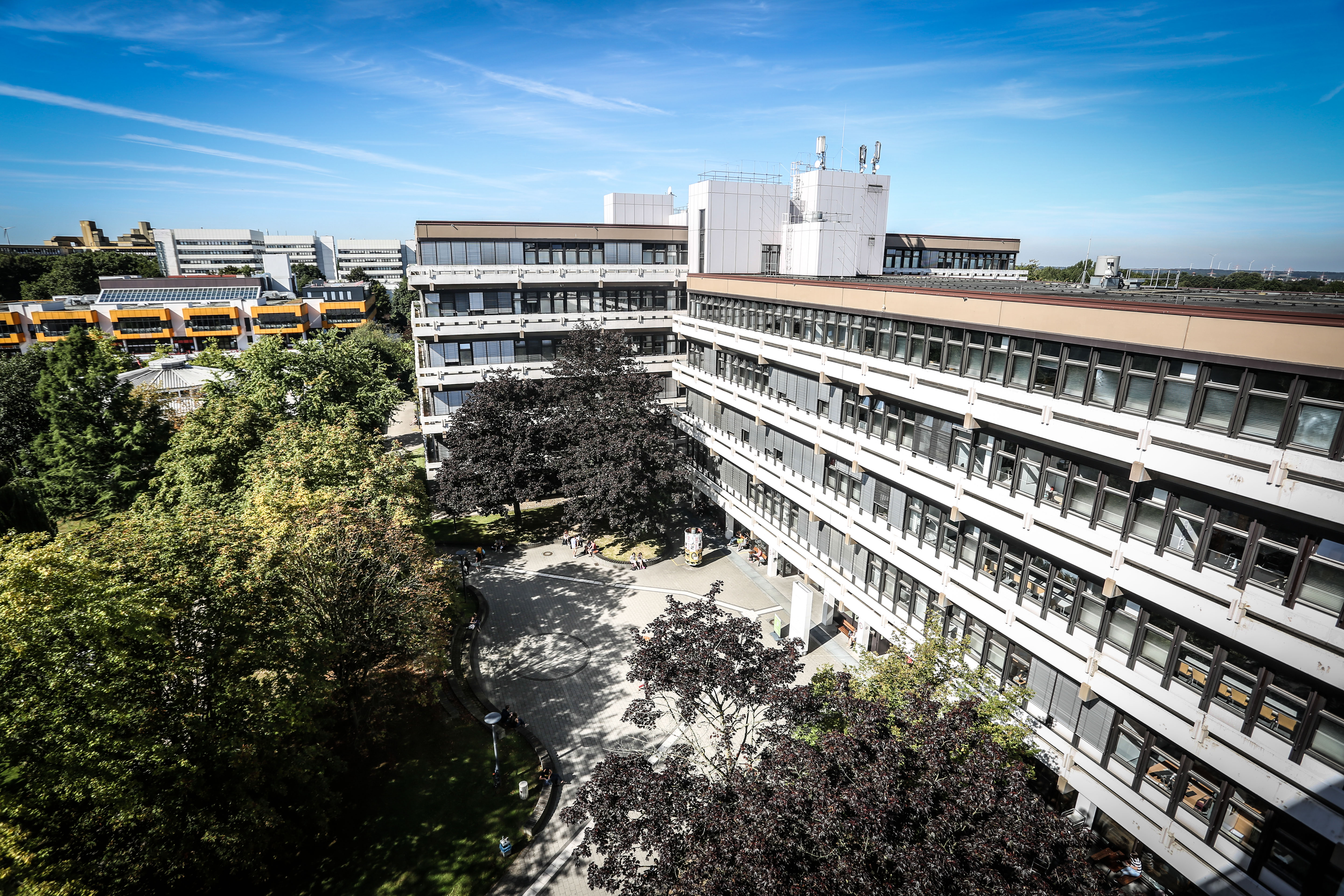 Im EF50-Gebäude sind die Bereiche Weiterbildung, sowie Behinderung im Studium angesiedelt.